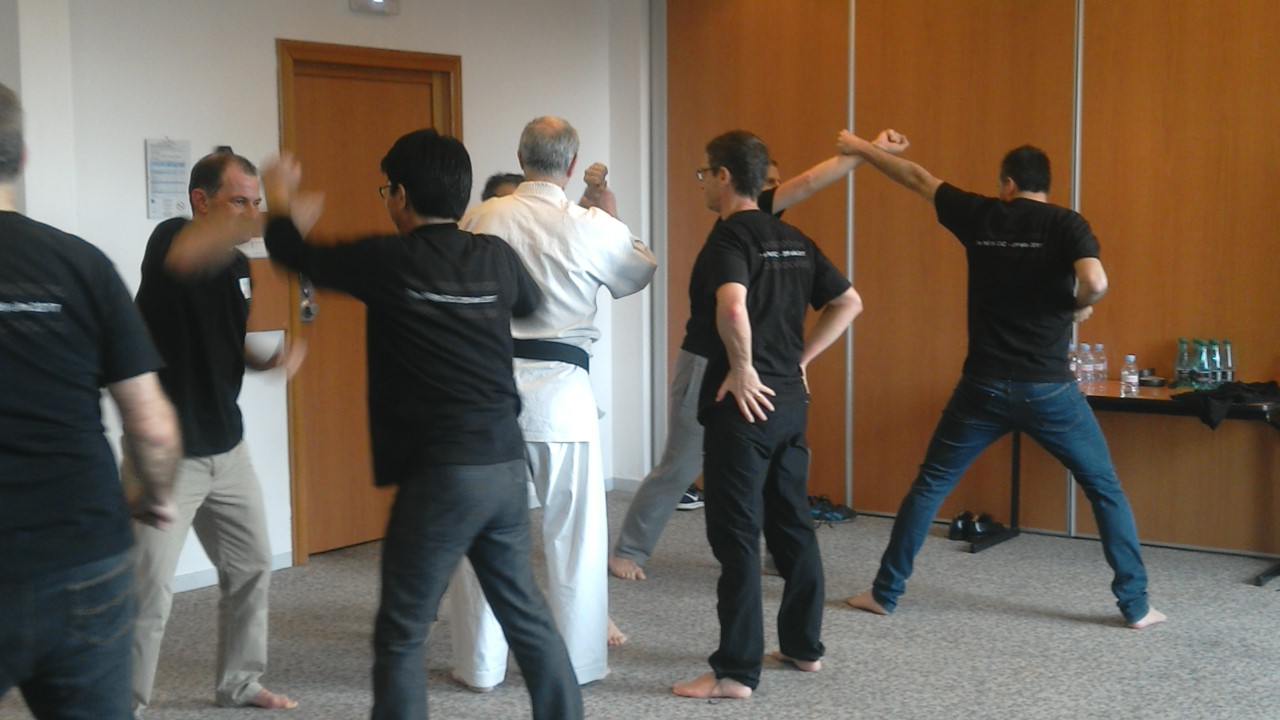 ne pas avoir peur des coups lors des échanges